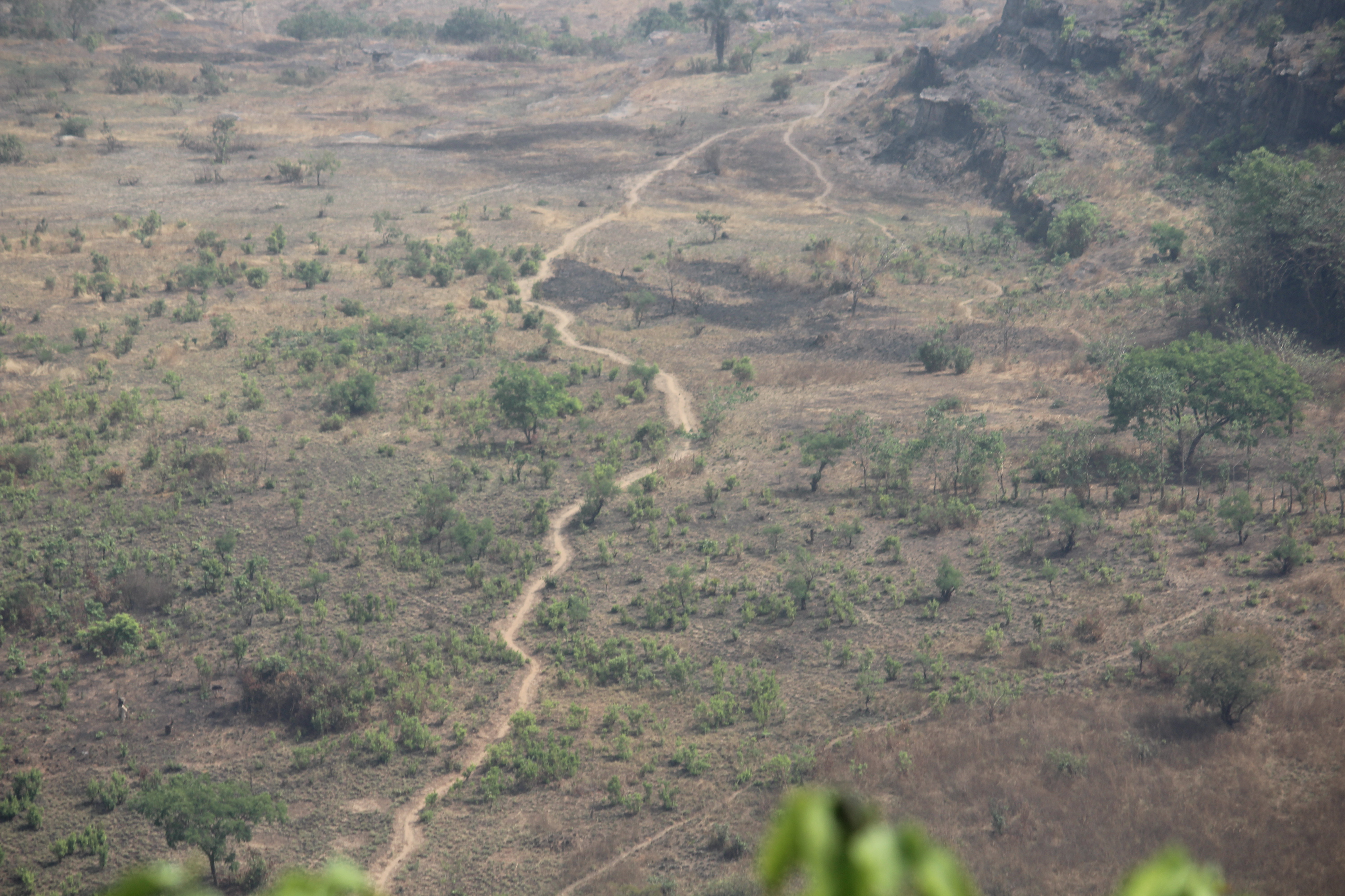 Chémin du Mont Gangan a Kindia This is an image with the theme "Africa on the Move or Transport" from: Guinea